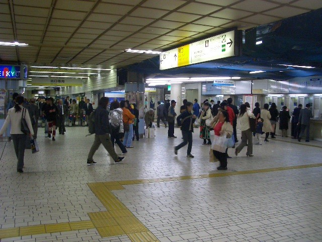 横浜駅京急線中央改札。2004年11月29日、本人撮影